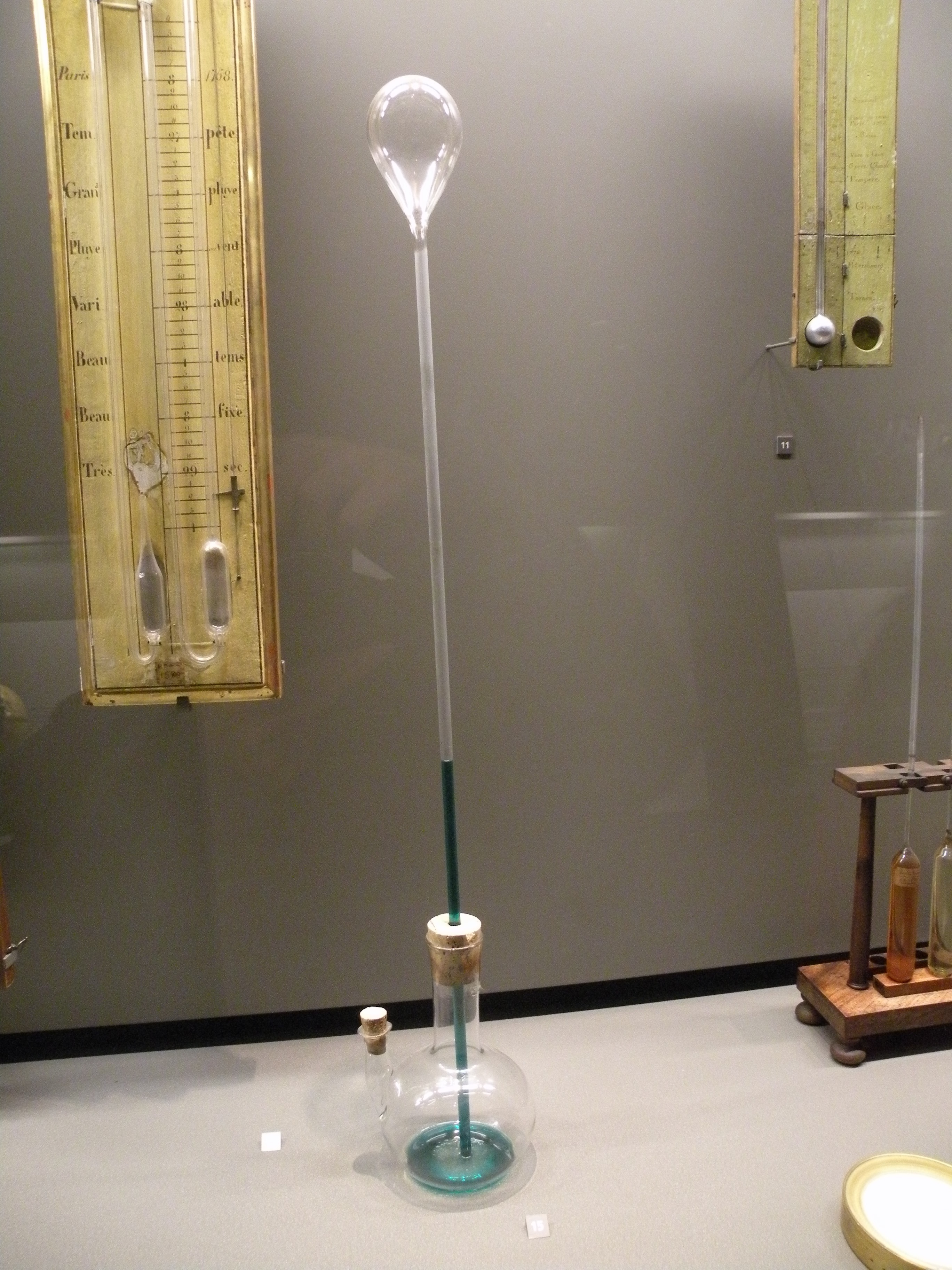 instrument Musée des Arts et Métiers